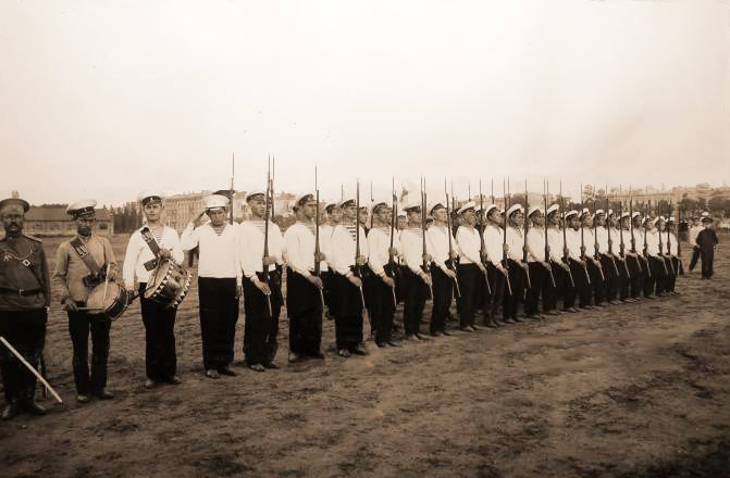 Військові Російської імперії на плацу. Одеса, Куликове поле.